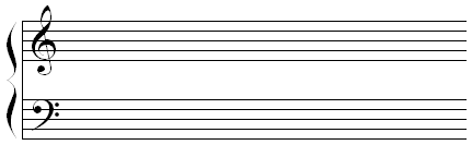 Grand Staff